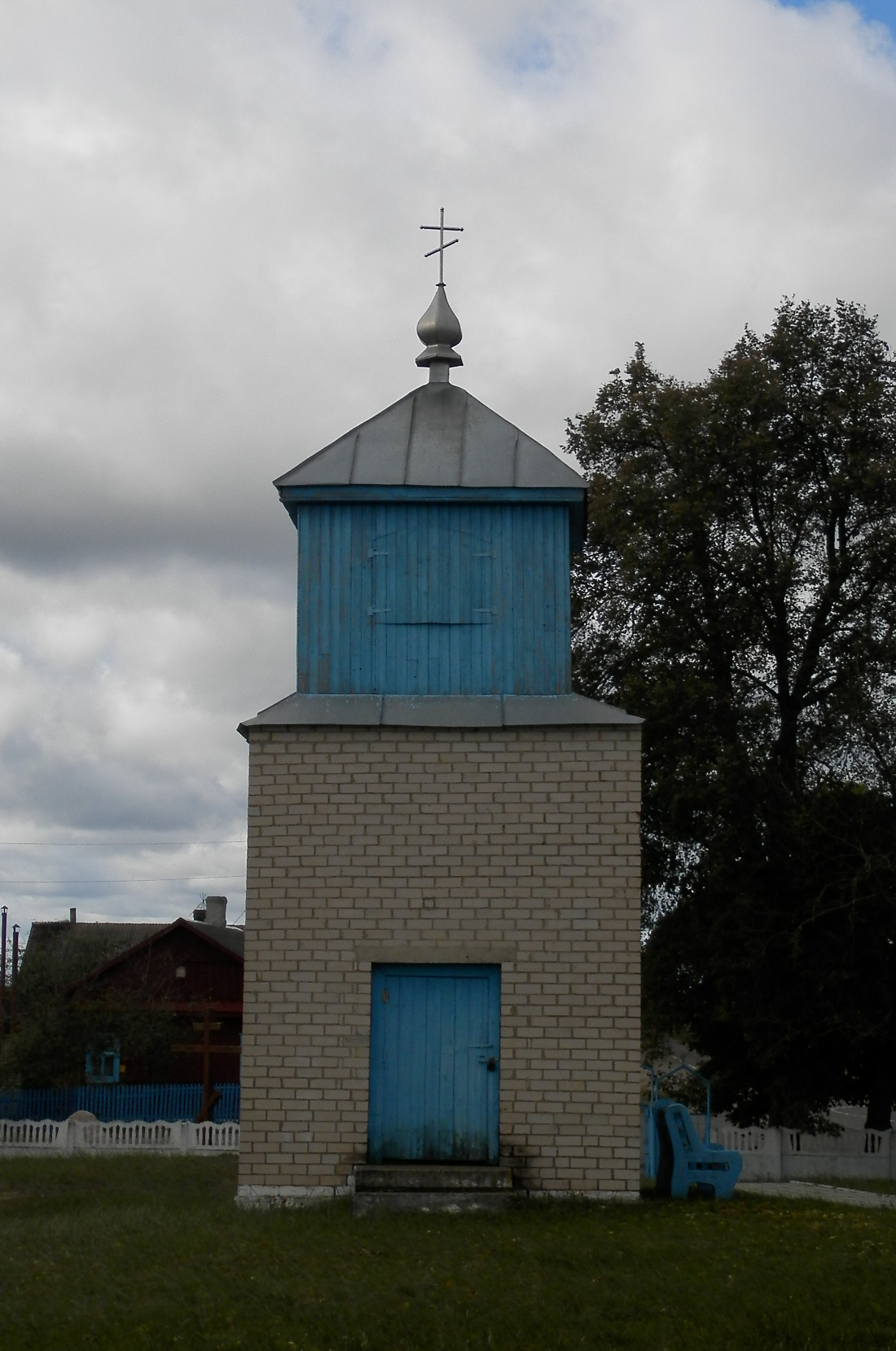 Вулька-Обровская. Церковь святого праведника Иоанна Кронштадтского (XIX век). Звонница